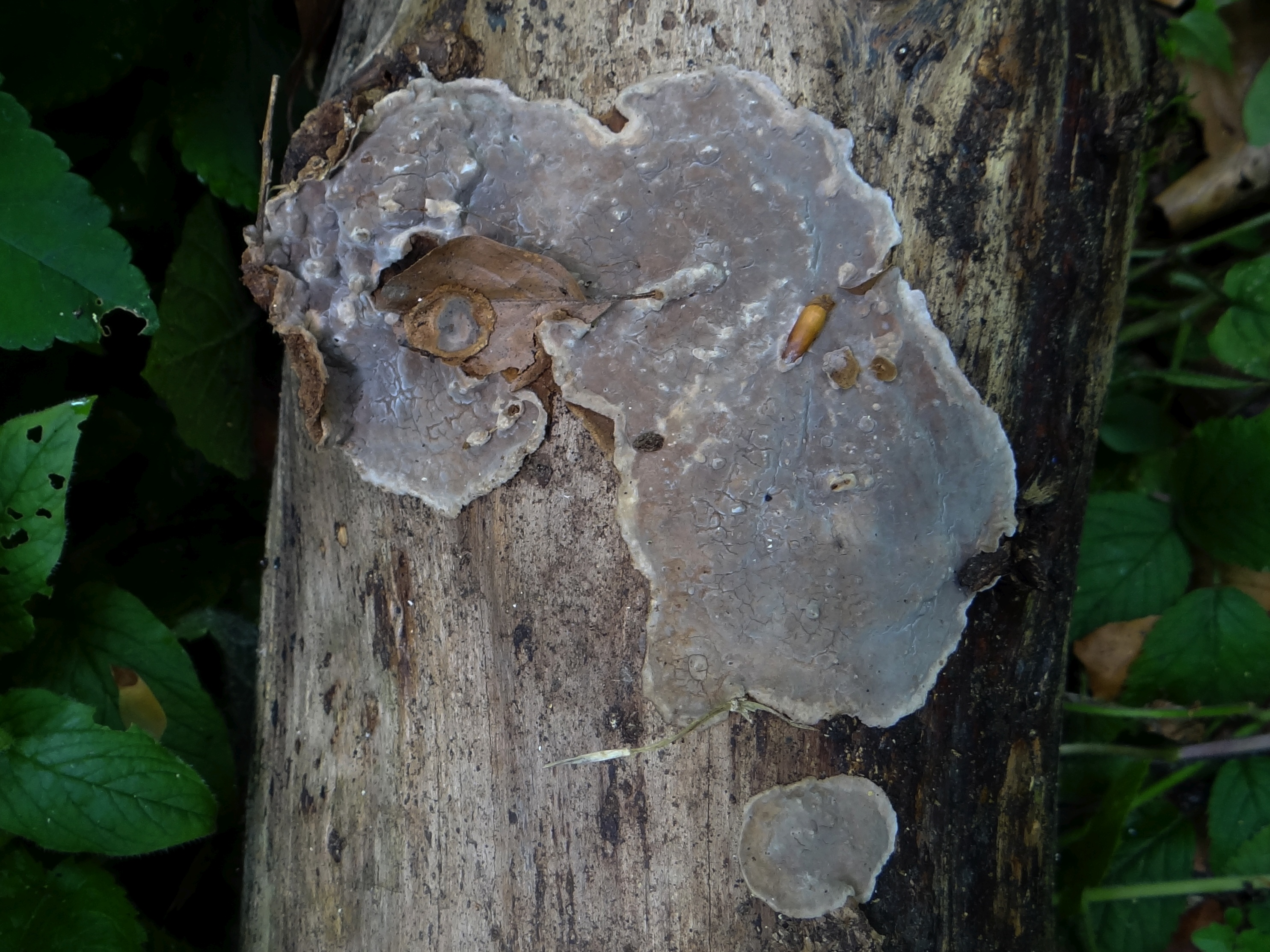 Kretzschmaria deusta (location: Poland, Gorce, Lubań)